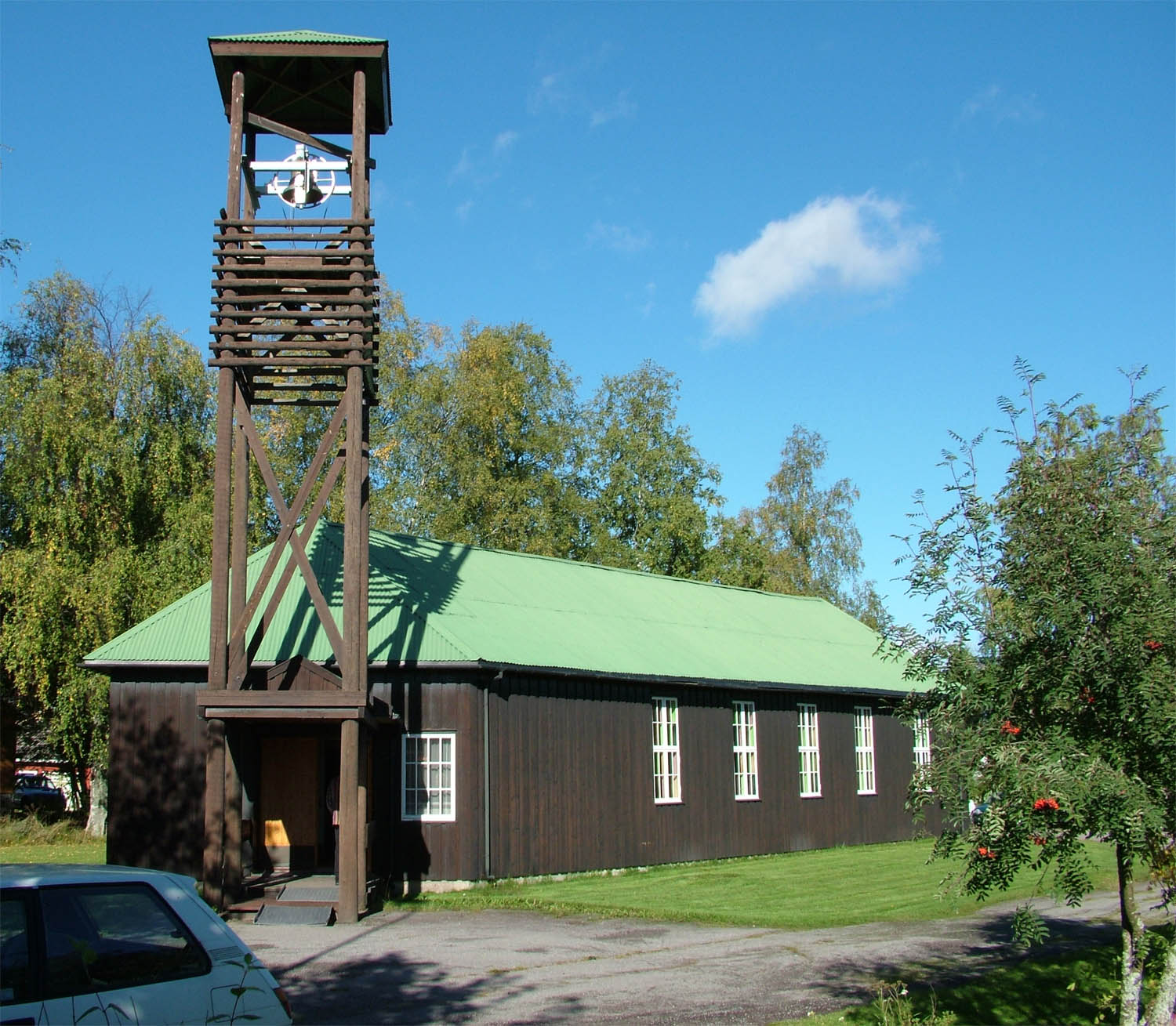 Roverud kirke i Kongsvinger kommune, Norway